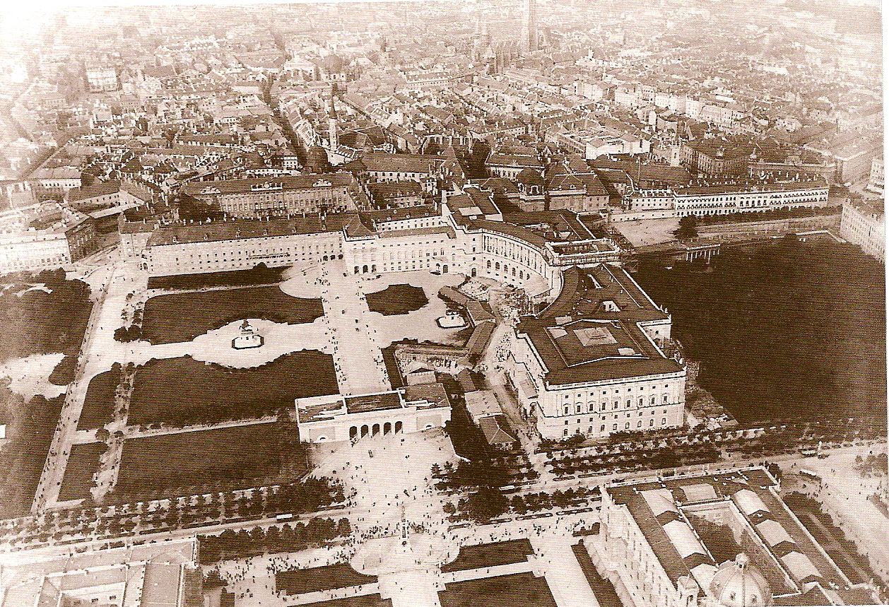 Der Wiener Heldenplatz in einer Aufnahme aus einem Ballon / The Heldenplatz in Vienna. photo made from a balloon.